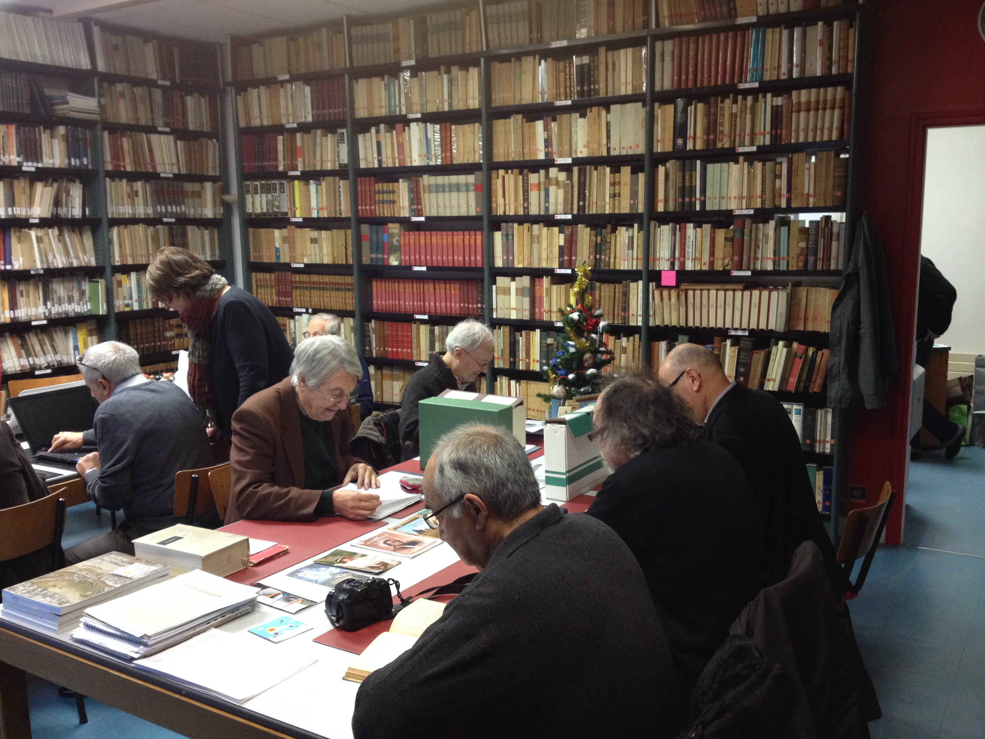 Salle de lecture de la bibliothèque de la société archéologique de Touraine